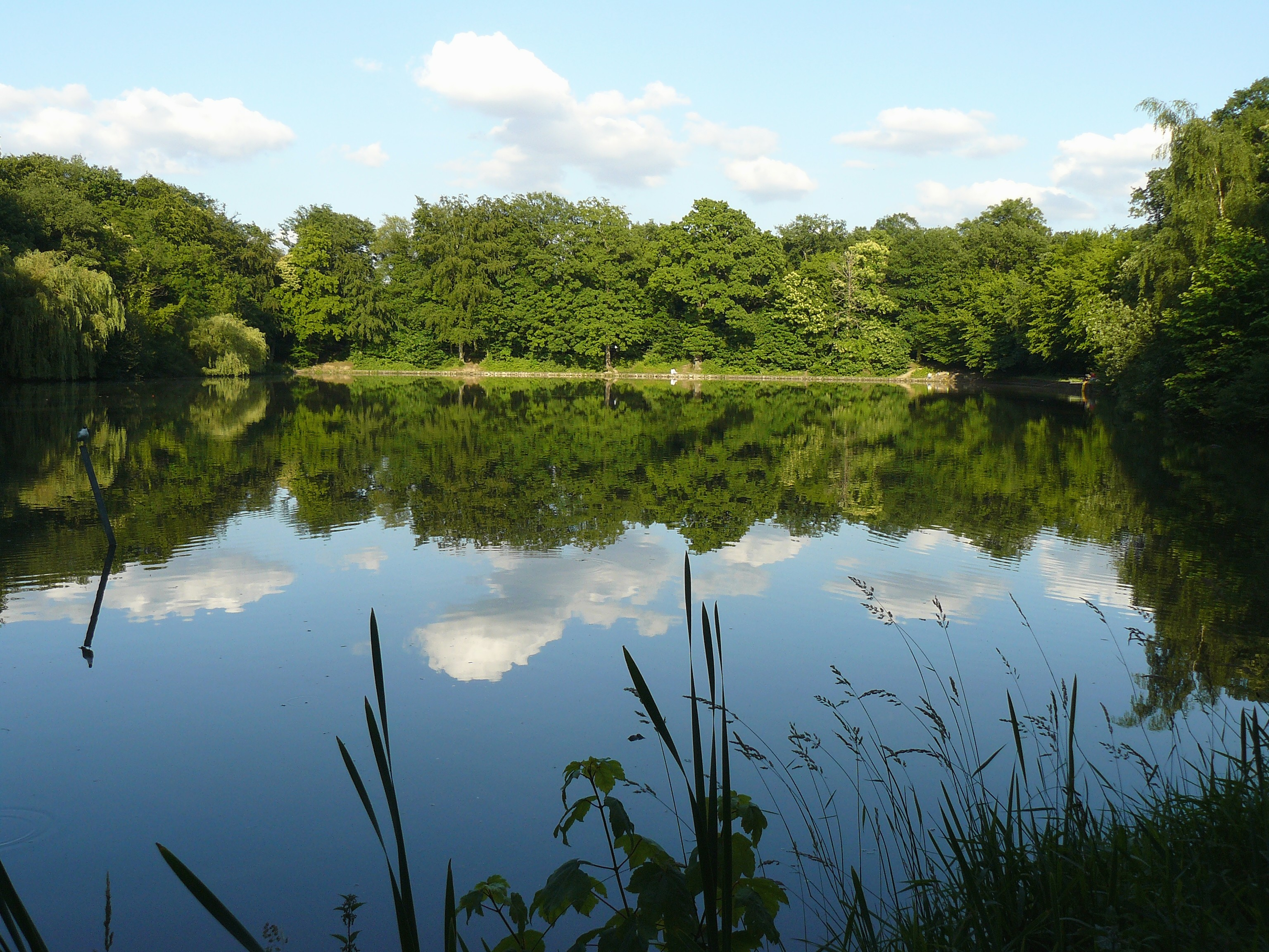 L'étang de Villebon, dans la forêt de Meudon (Hauts-de-Seine, France)